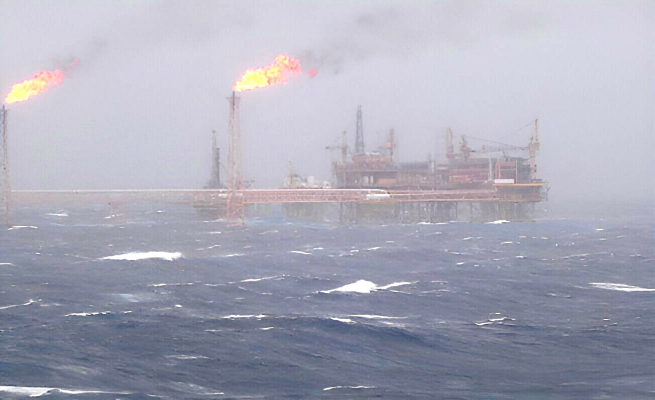 Cantarell RIGS